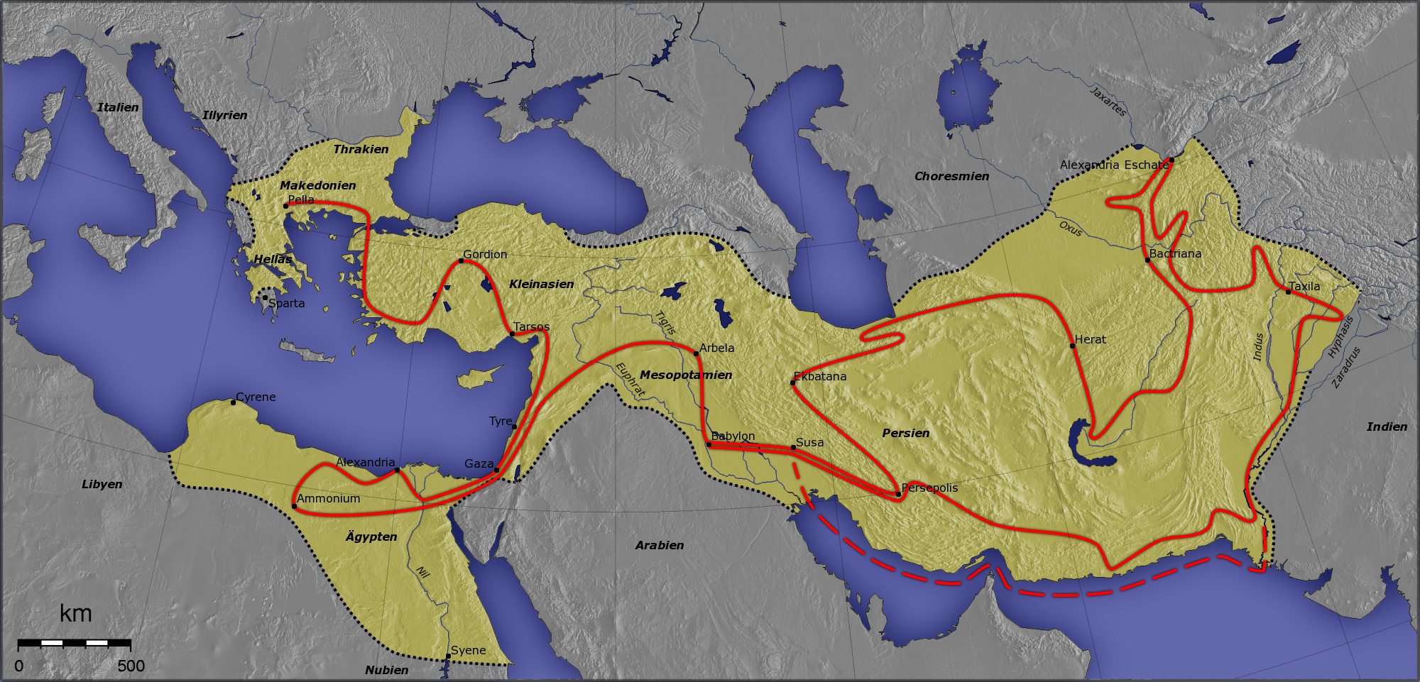 Nagy Sándor hadjáratainak útvonala